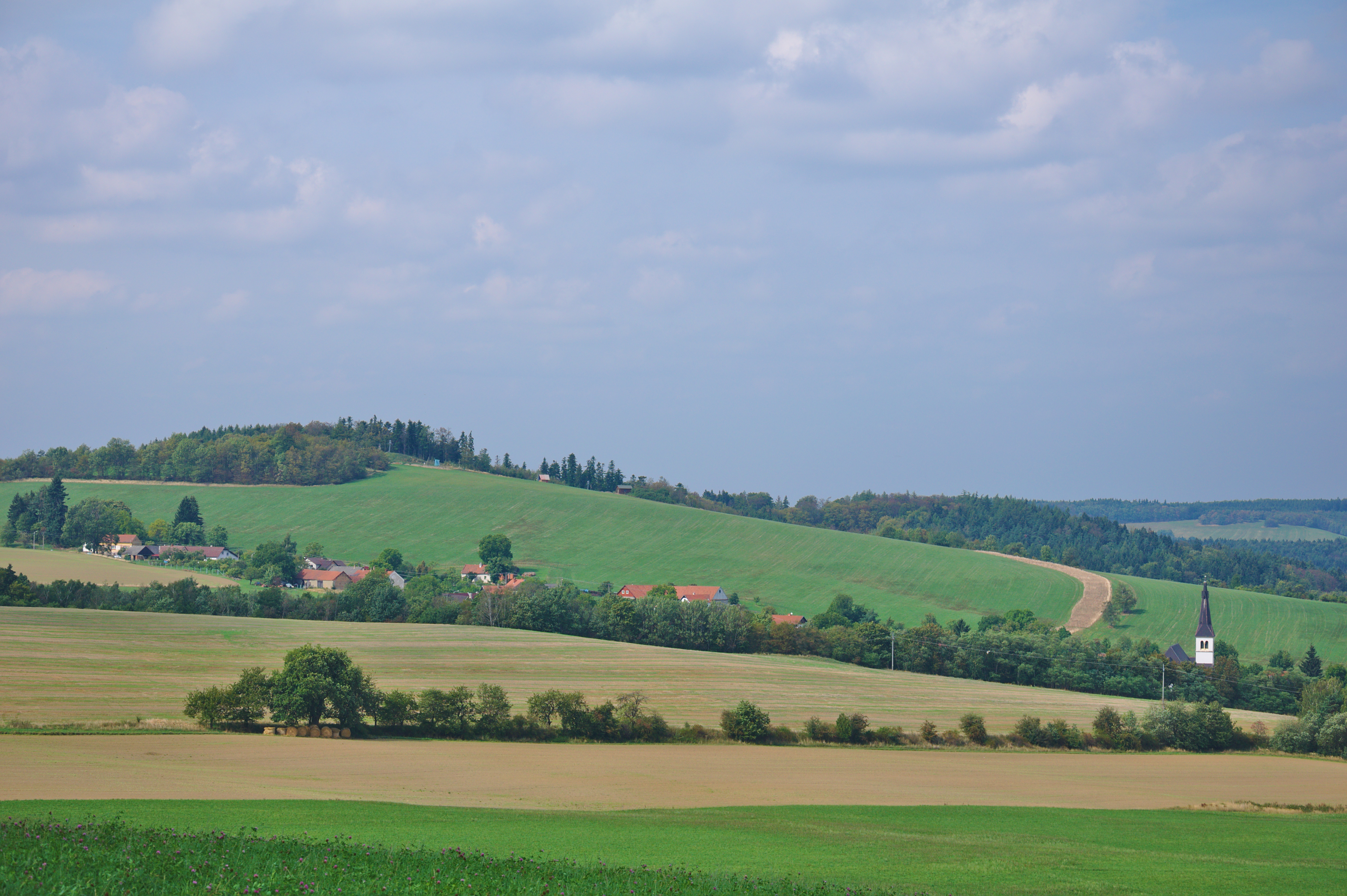 Vyšehrad a Zahálkovy skalky, Kladky, okres Prostějov